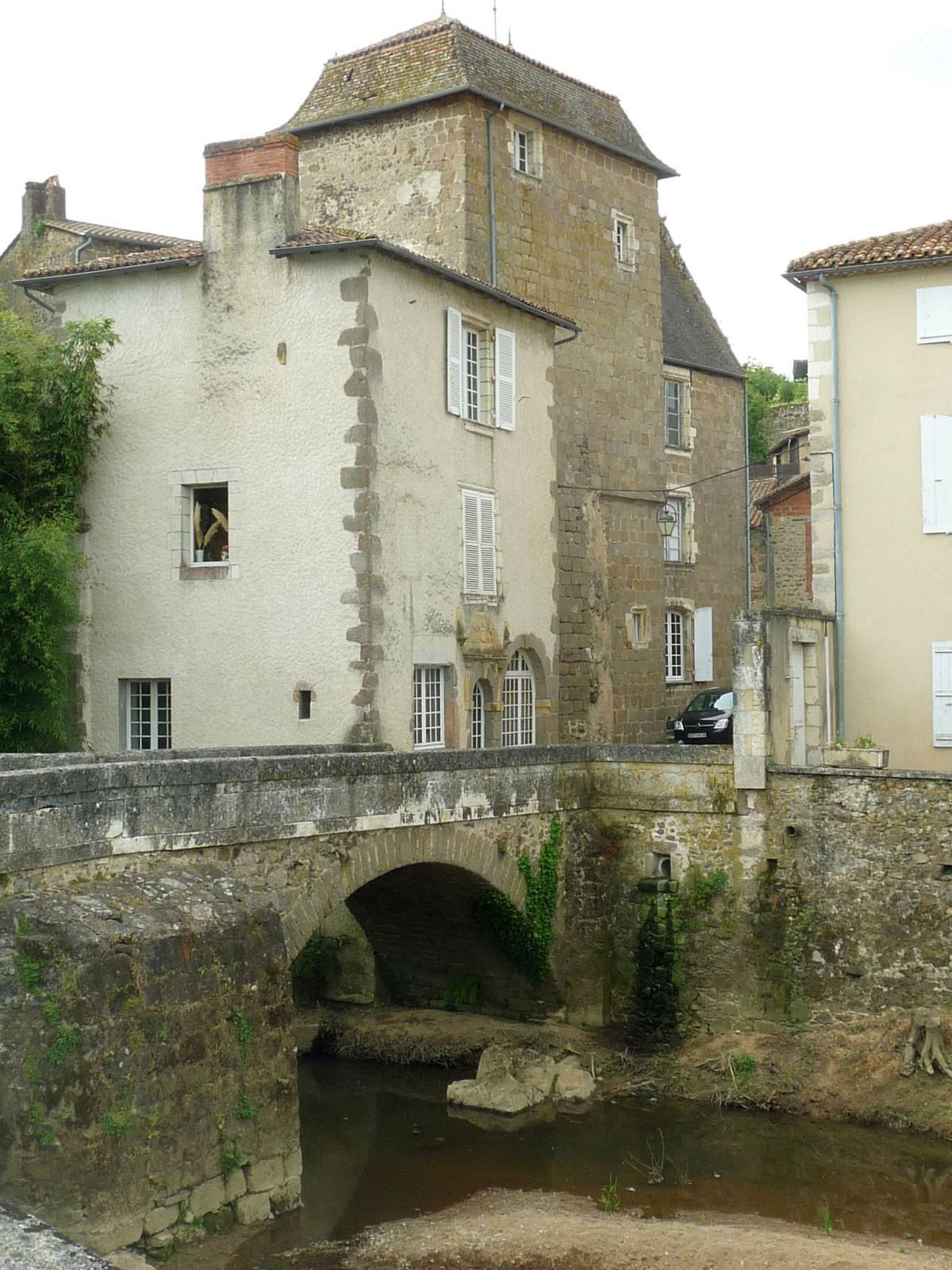 Le Goire, Confolens (Charente, France)